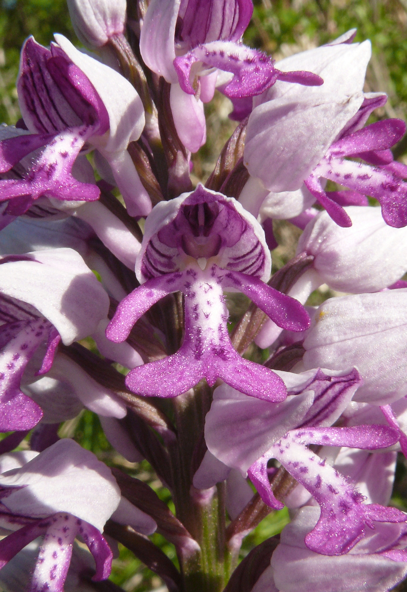 Orchis militaris,Hohenlohe, Deutschland